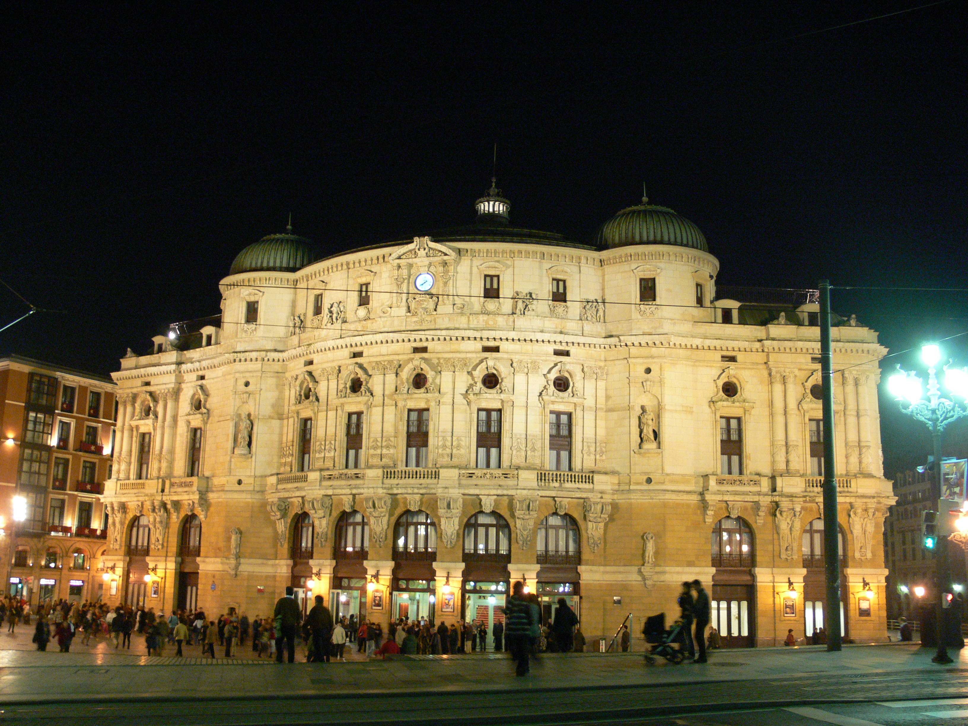 Teatro Arriaga, Bilbao.